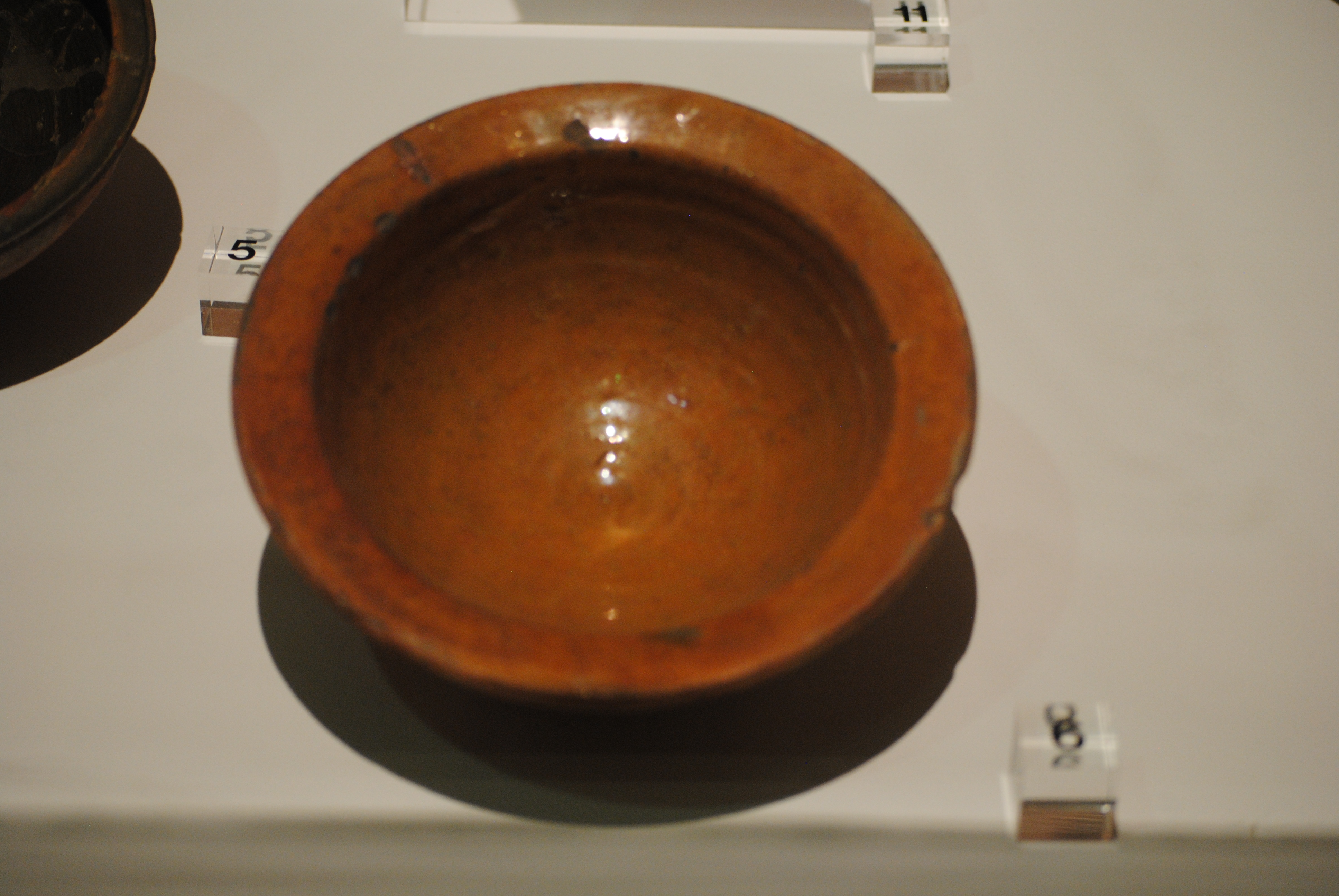 Scodella invetriata monocroma di produzione pisana usata come bacino ceramico agli inizi del XIII secolo (chiesa di Santa Cecilia, Pisa) - Museo nazionale di San Matteo.